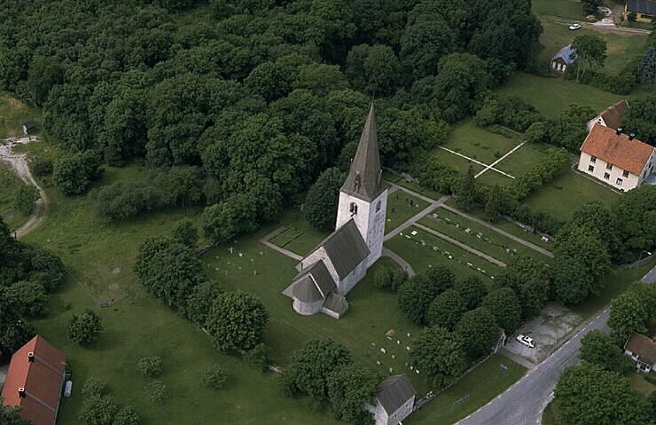 Motiv: Fardhems kyrka Nyckelord: Flygbilder, Riksintressen Kategori: KyrkomiljöFardhems kyrka